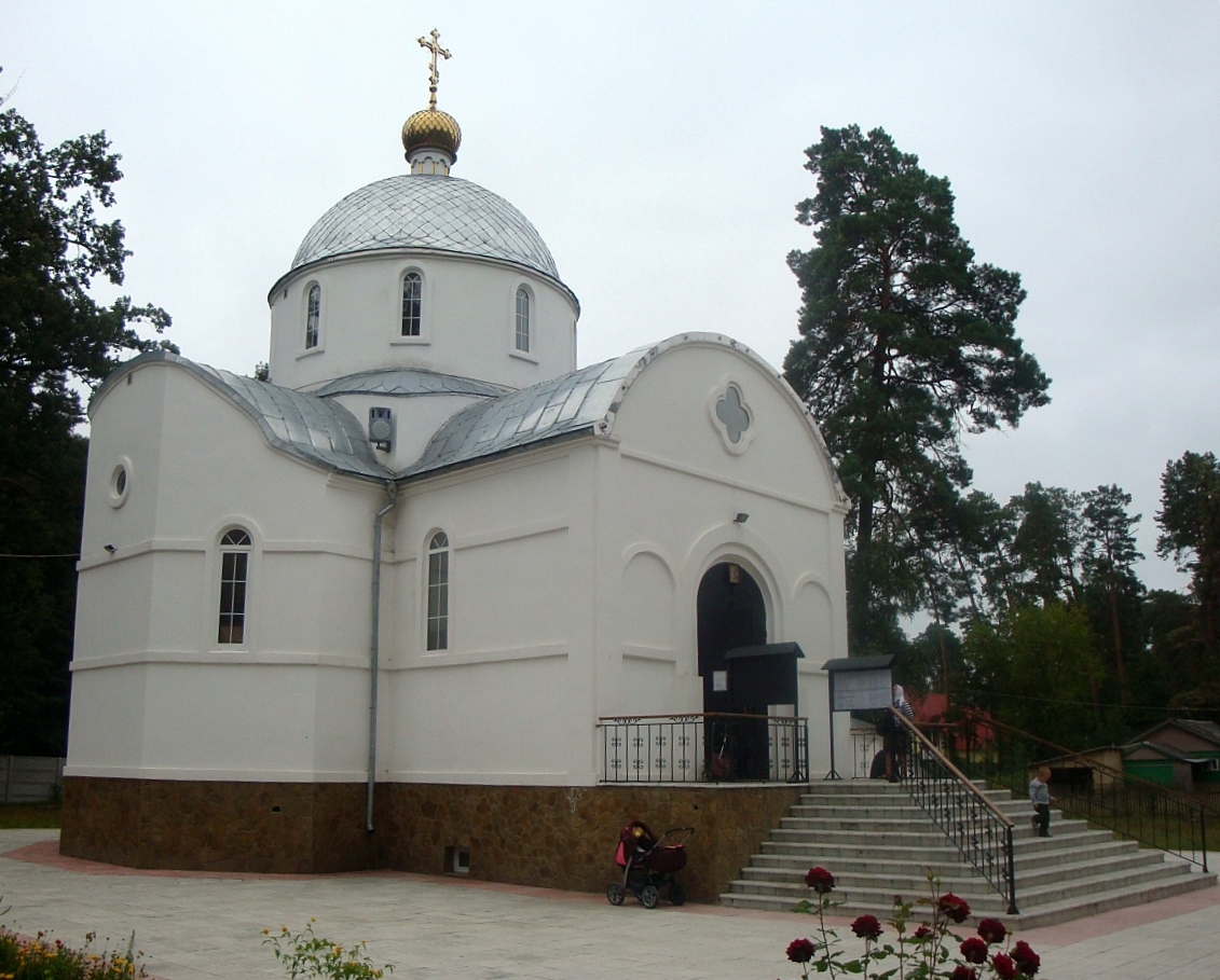 Церква у Ворзелі